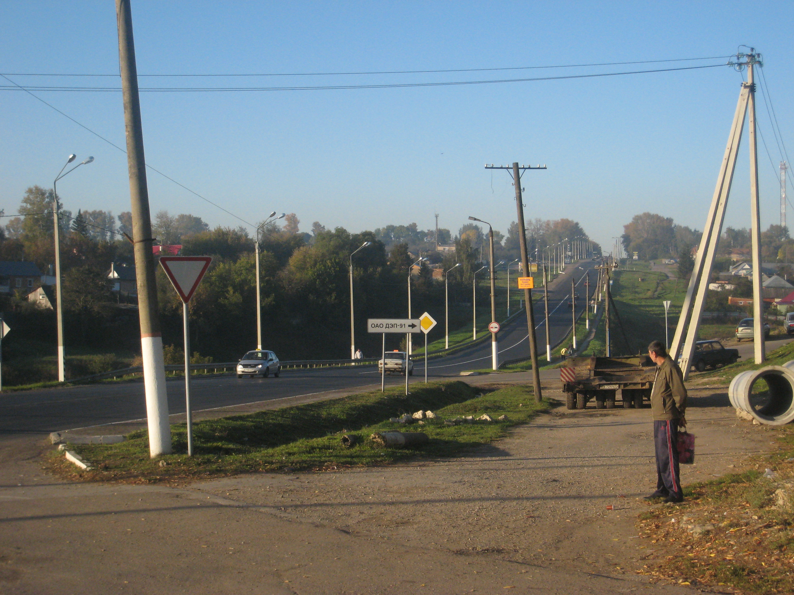 Заправка ТНК в Плавске. Направление - из Москвы.